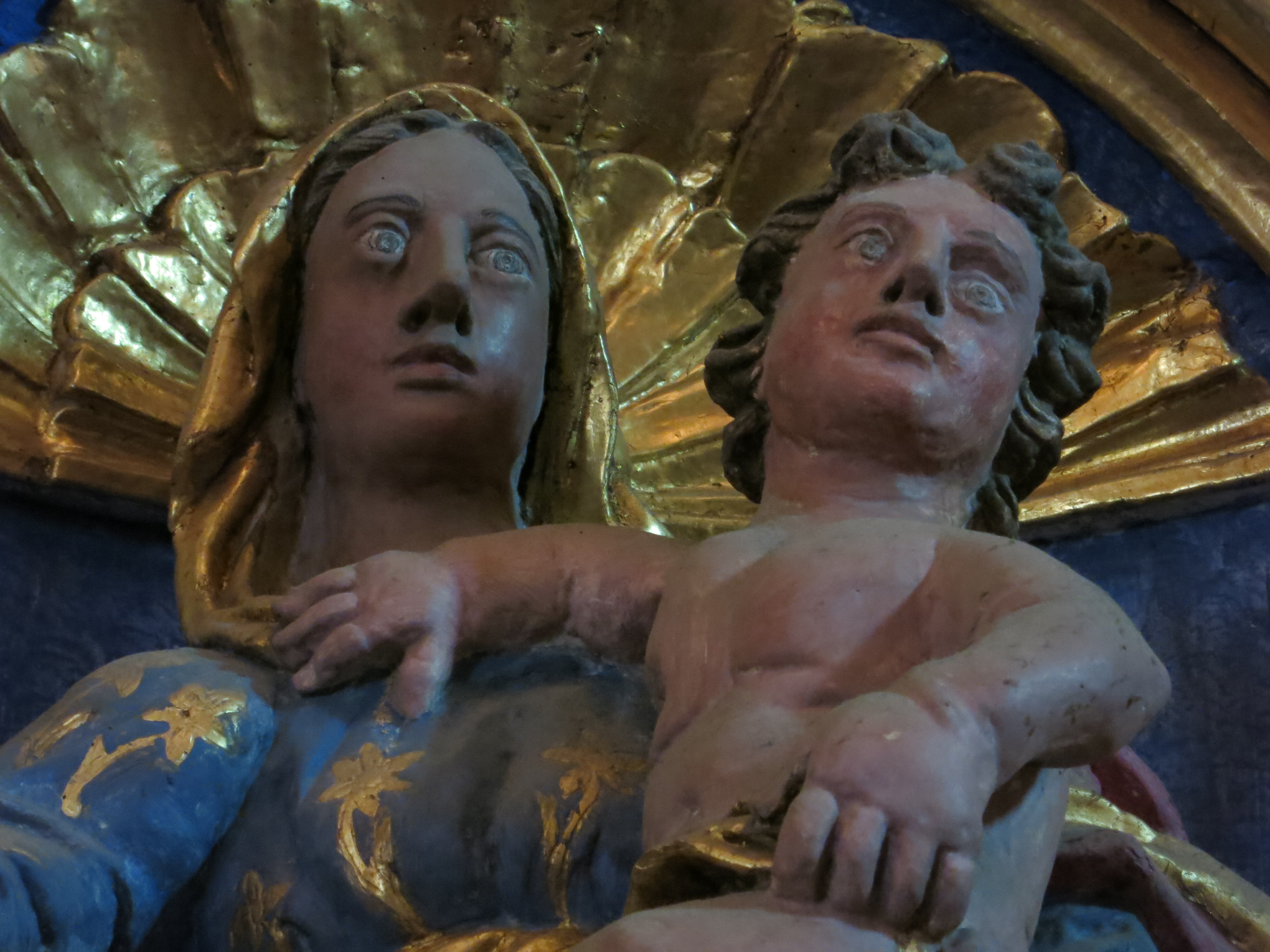 Vierge à l'enfant, sculpture de l'église de Montaner